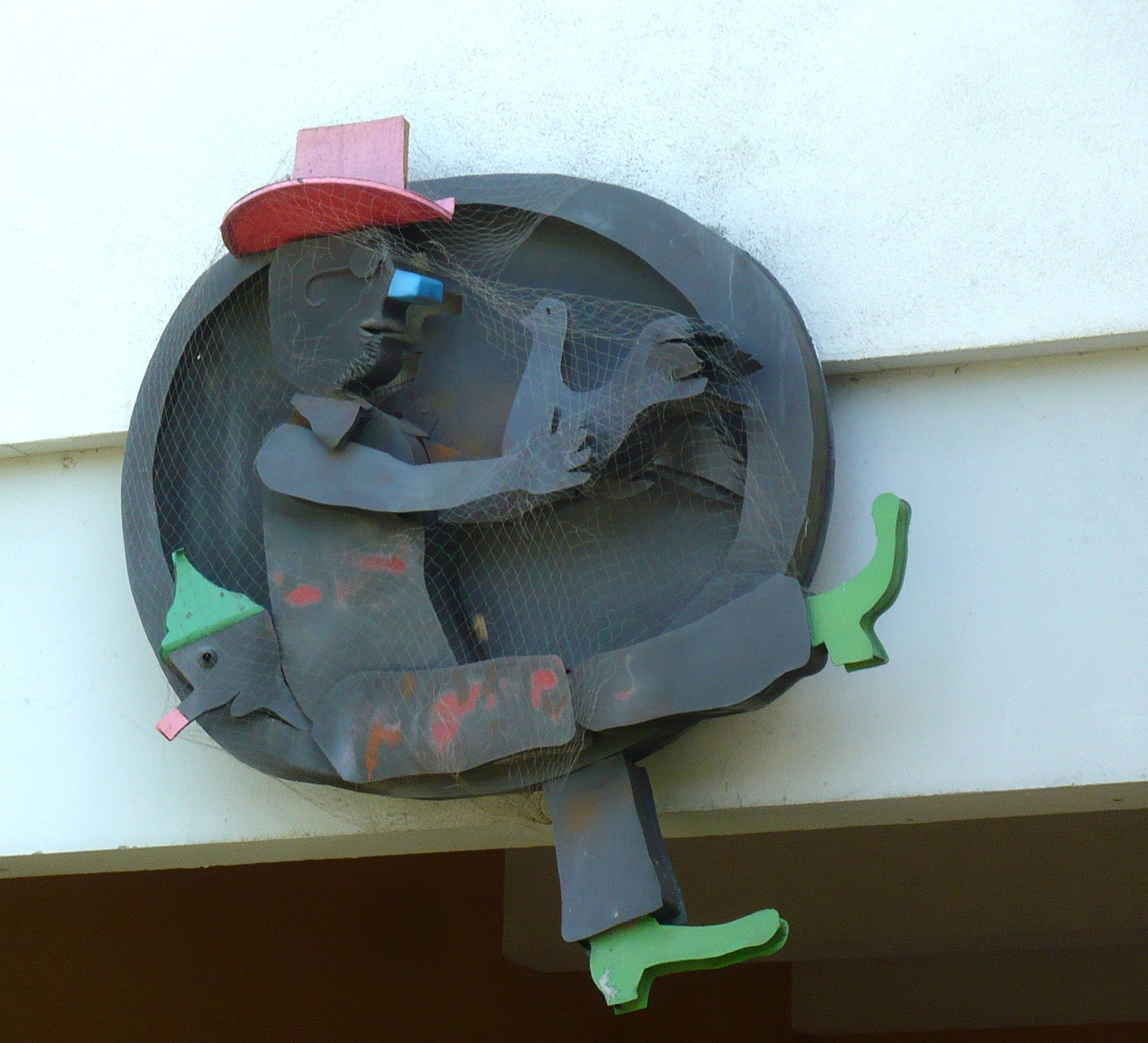 Ortsteil Marzahn: Blumberger Damm, Hauszeichen Mann mit Taube